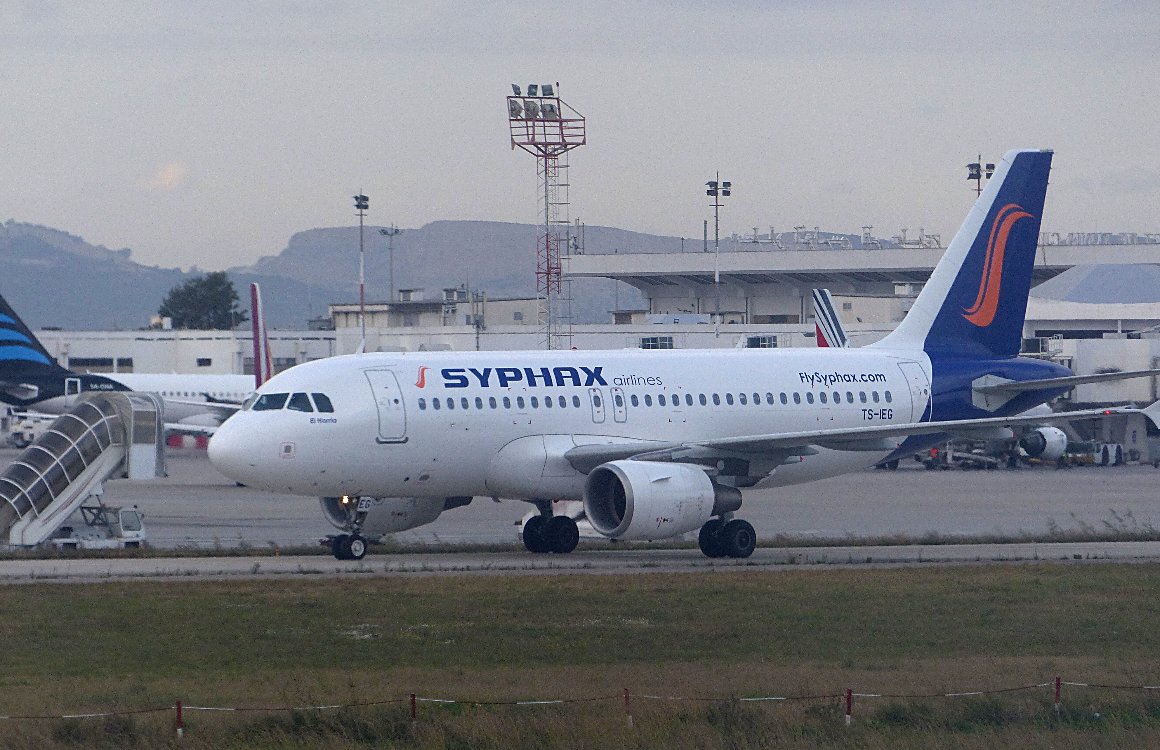 L'Airbus A319 'El Horria' de Syphax Airlines sur le tarmac de l'aéroport de Tunis Carthage.